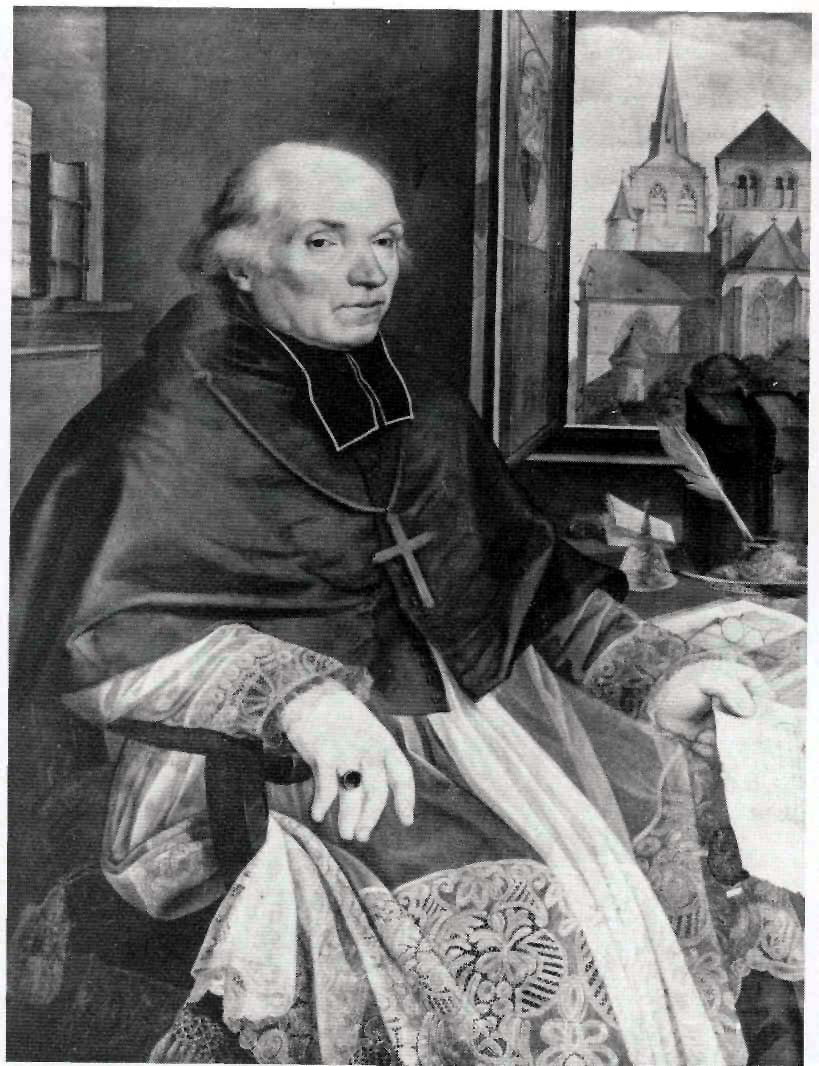 Joseph von Hommer, Weihbischof in Trier